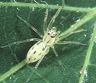 female Asemonea tanikawai from Okinawa.